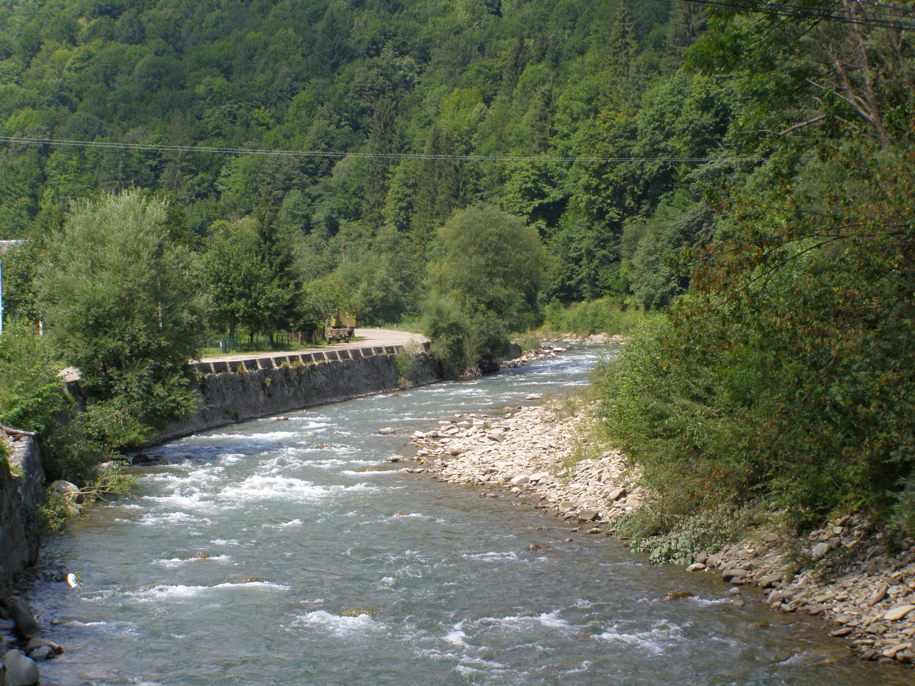 Řeka Teresva protékající městem Usť-Čorna